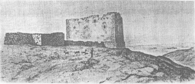 Rovine del castello sul Monte Bonifato (detto "Castello Ventimiglia") in una rappresentazione del Principe di Torremuzza (1779)